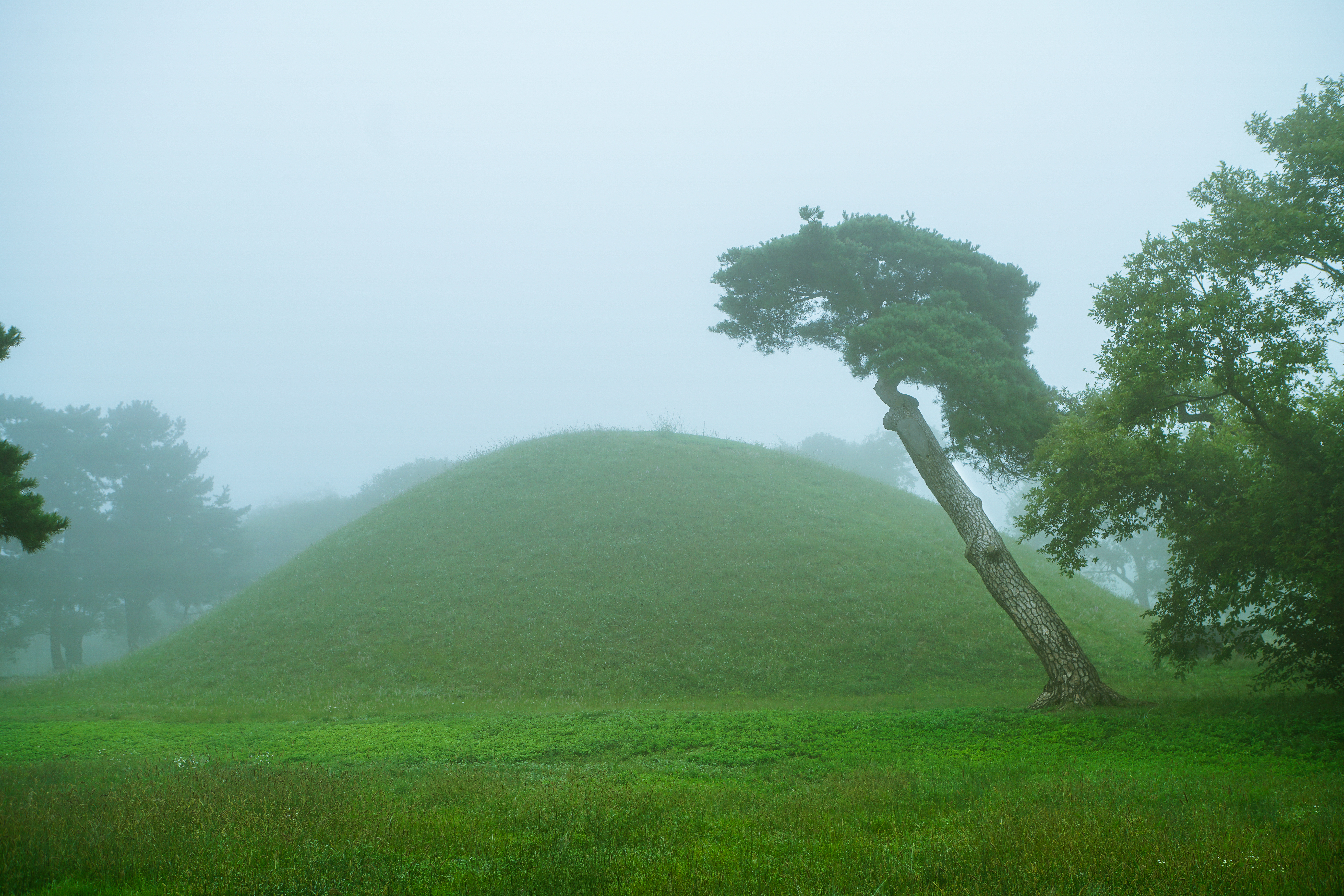 진평왕릉 Historical Site-180